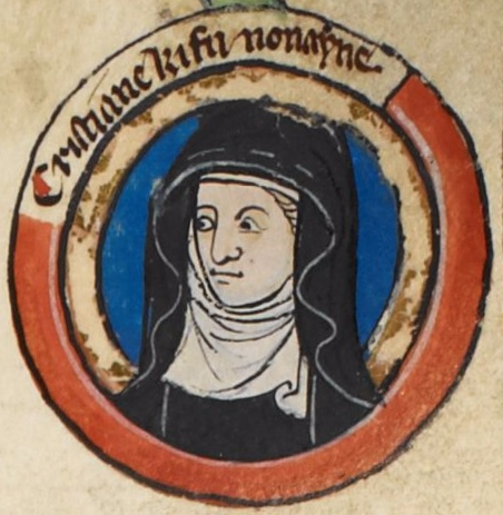 Miniature de Christine, fille d'Édouard l'Exilé, dans une généalogie royale du XIVe siècle